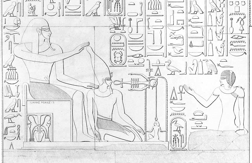 Semna-West, Tempel Thutmosis' III., Aussenwand West, Detail: Der thronende Dedun krönt den vor ihm knienden Thutmosis III. mit der Weissen Krone, ihnen zugewandt steht Iunmutef im Rezitatiionsgestus.